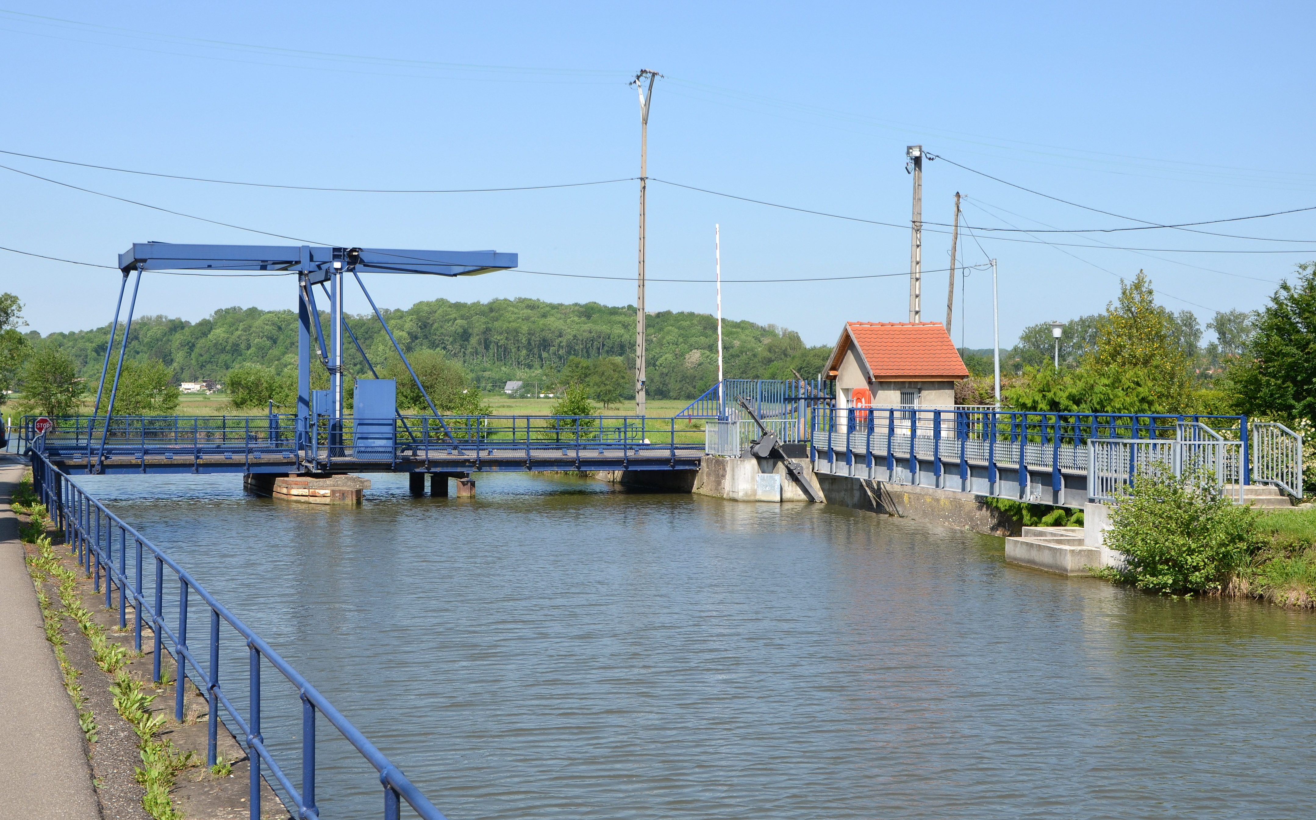 Canal du Rhone au Rhin a Zillisheim , Haut-Rhin, Alsace, France